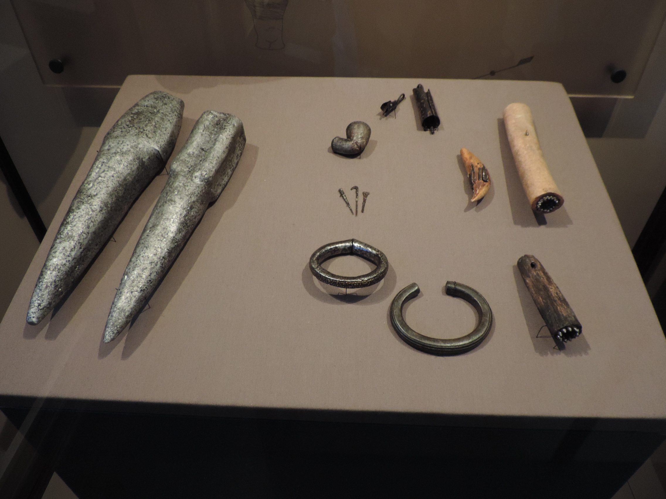 Cyilima II Rujugira a probablement régné sur le Rwanda au XVIII en tant que mwani (roi), mais son corps a été conservé et n'a été inhumé qu'en 1932. La tête du roi repose sur deux grandes enclumes, et d'autres présents funéraires font également référence au travail du métal.